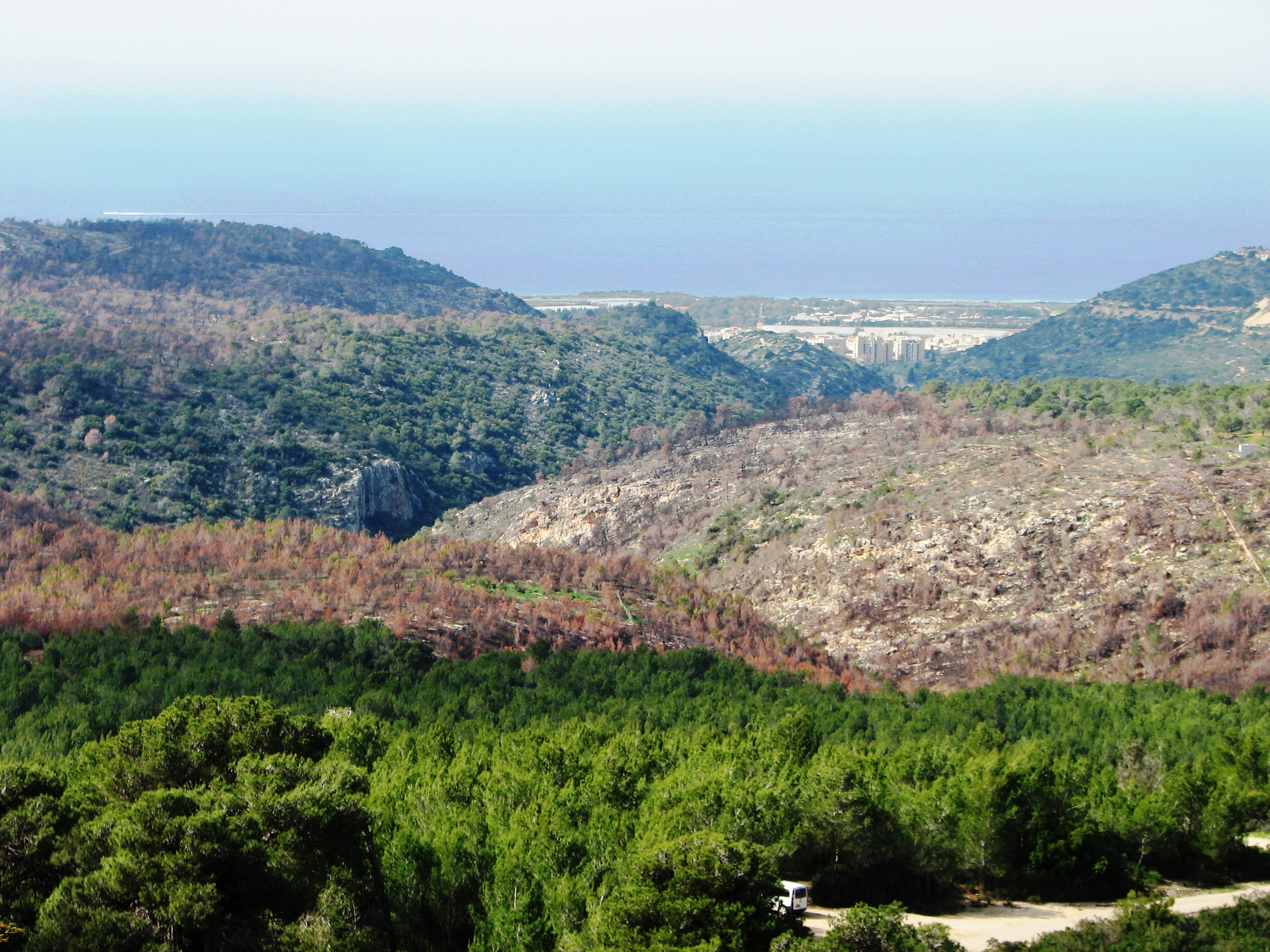 Nahal Galim Nature reserve on Mount Carmel נחל גָּלִּים הוא נחל בהר הכרמל באזור הכרמל הגבוה. תחילתו ליד ומדרום לאוניברסיטת חיפה בחיפה ליד קו פרשת המים וכביש 672 בגובה של 400 מטר מעל פני הים. הנחל הוא חלק מפארק הכרמל. ושמורת טבע נחל גלים תצפית מחניון הצוק. בקצה הנחל באופק בתי טירת כרמל בנוף שרידי השריפה של דצמבר 2010